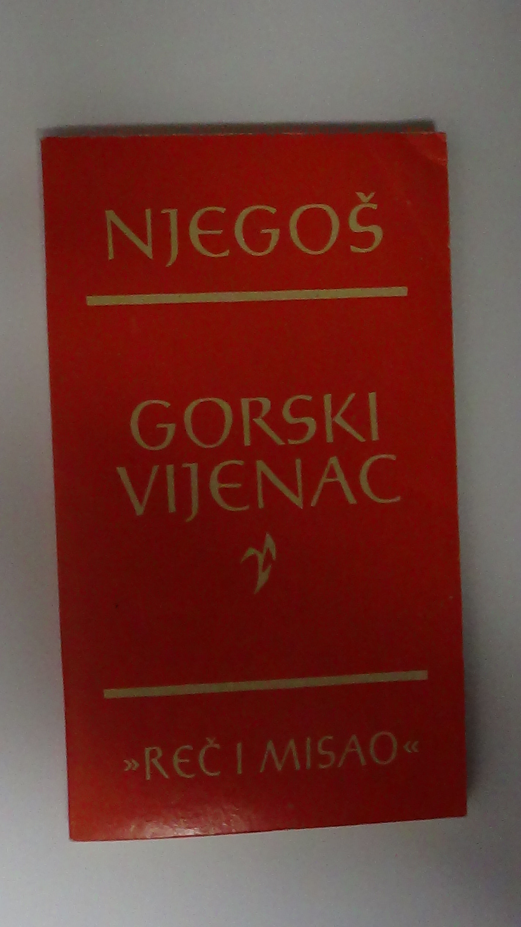 „Горски венец“, Рад, Белград, 1962